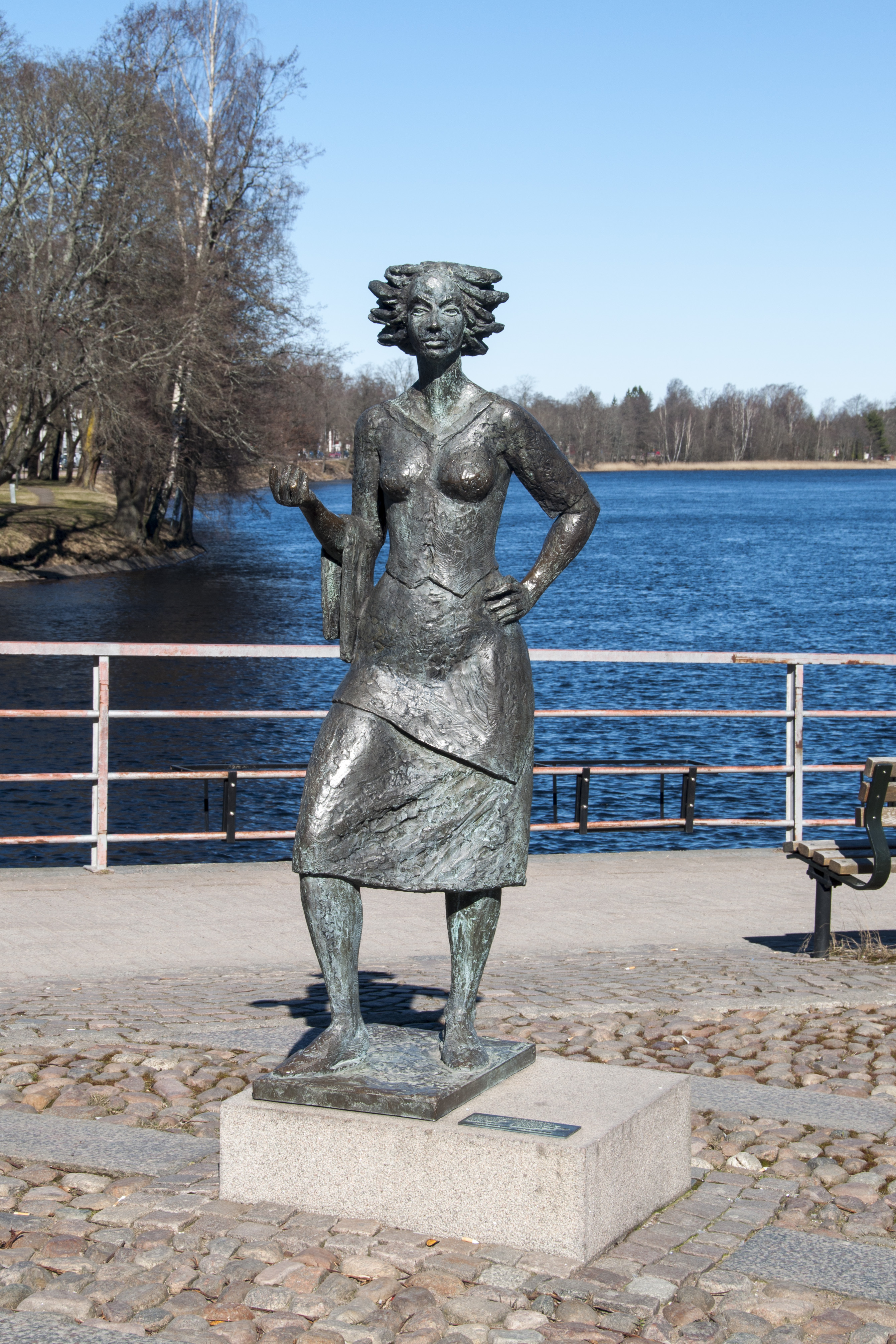 Sola i Kallsta, Herman Reijers (1985)